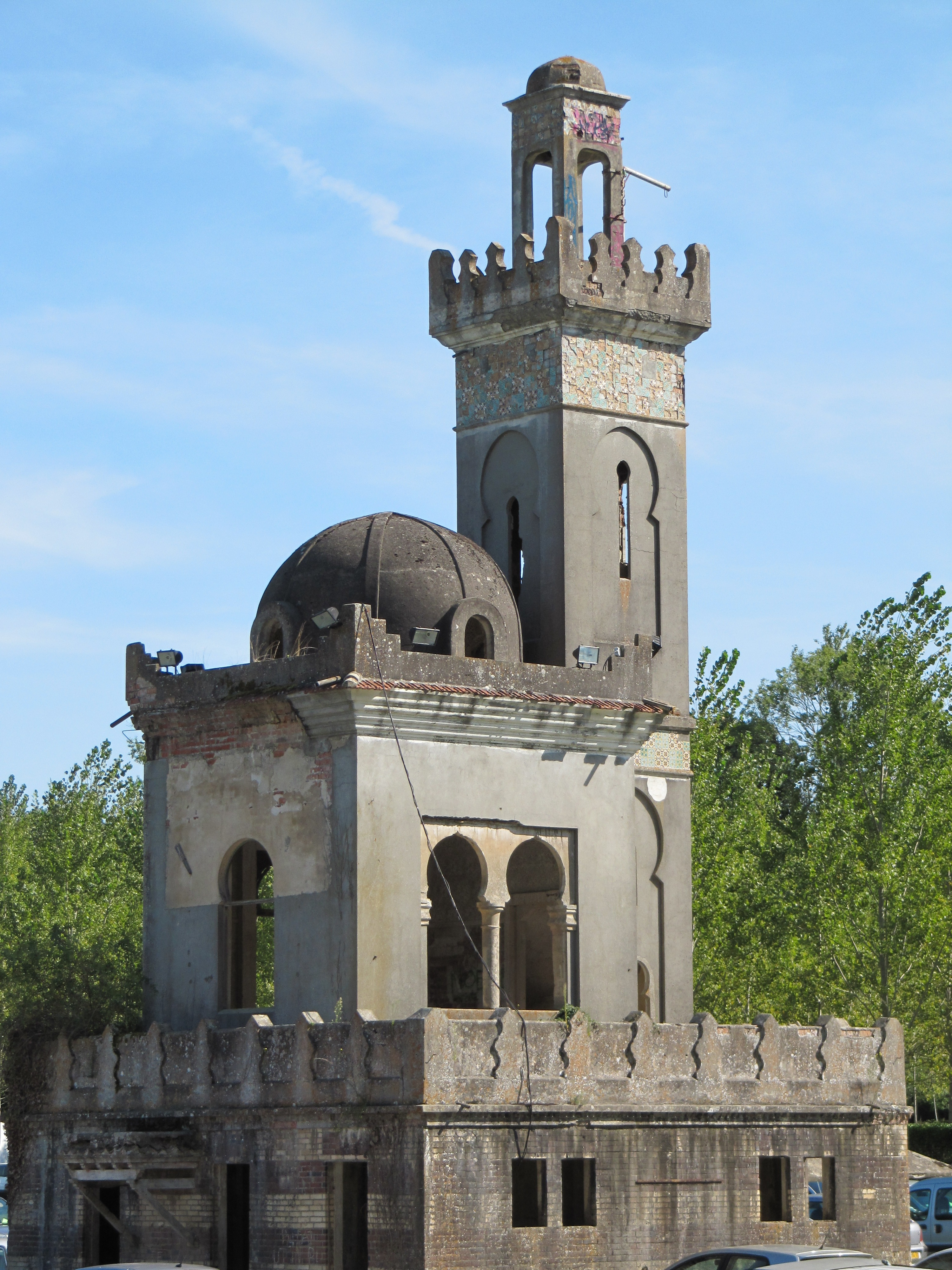 La mosquée du champ de course